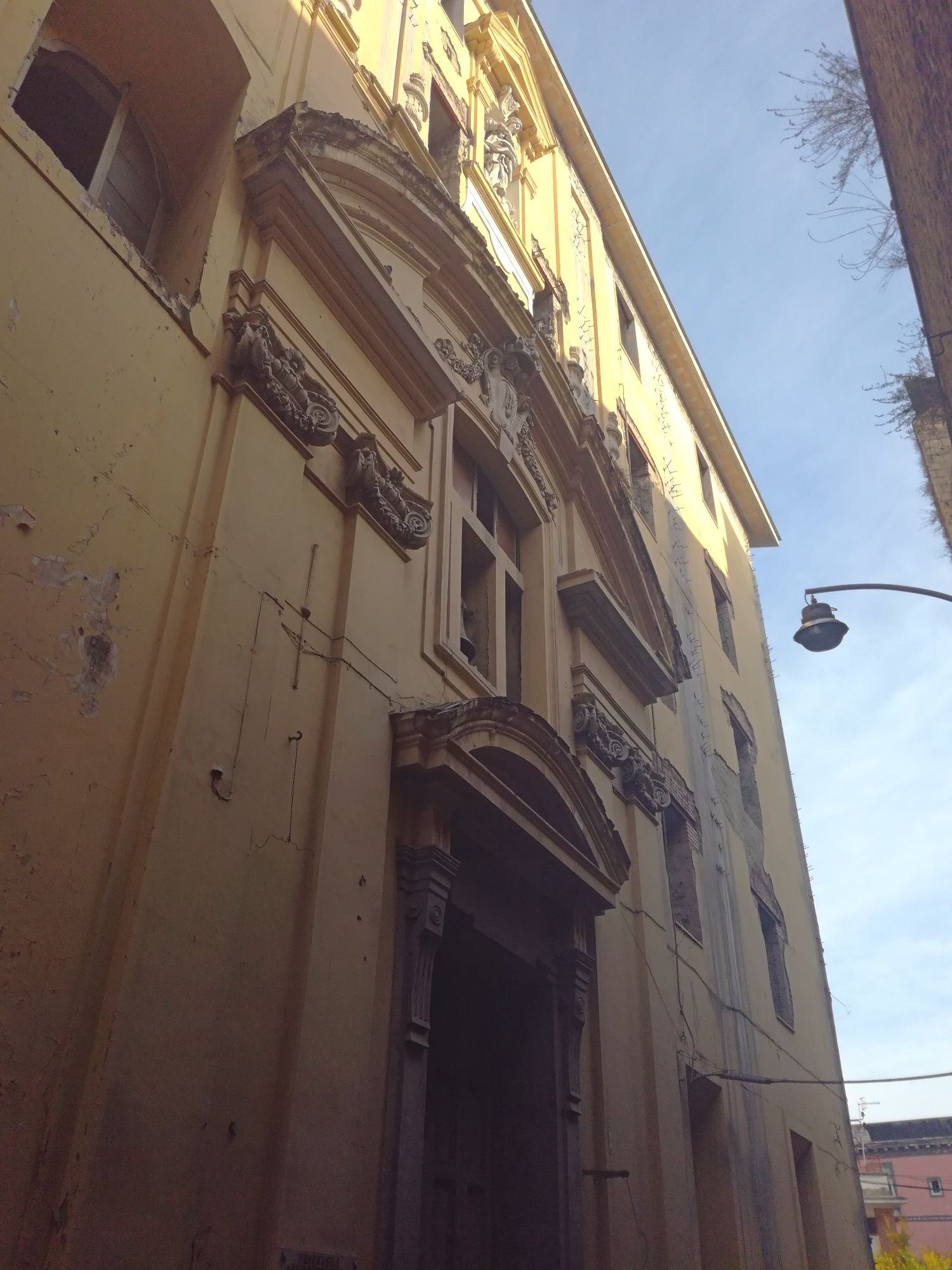 Chiesa della Concezione a Materdei, salita San Raffaele (Napoli)